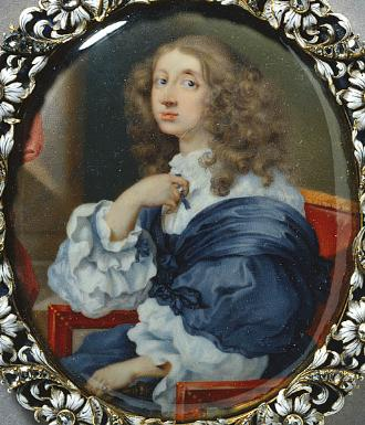 Kristina, drottning av Sverige (1626-1689)